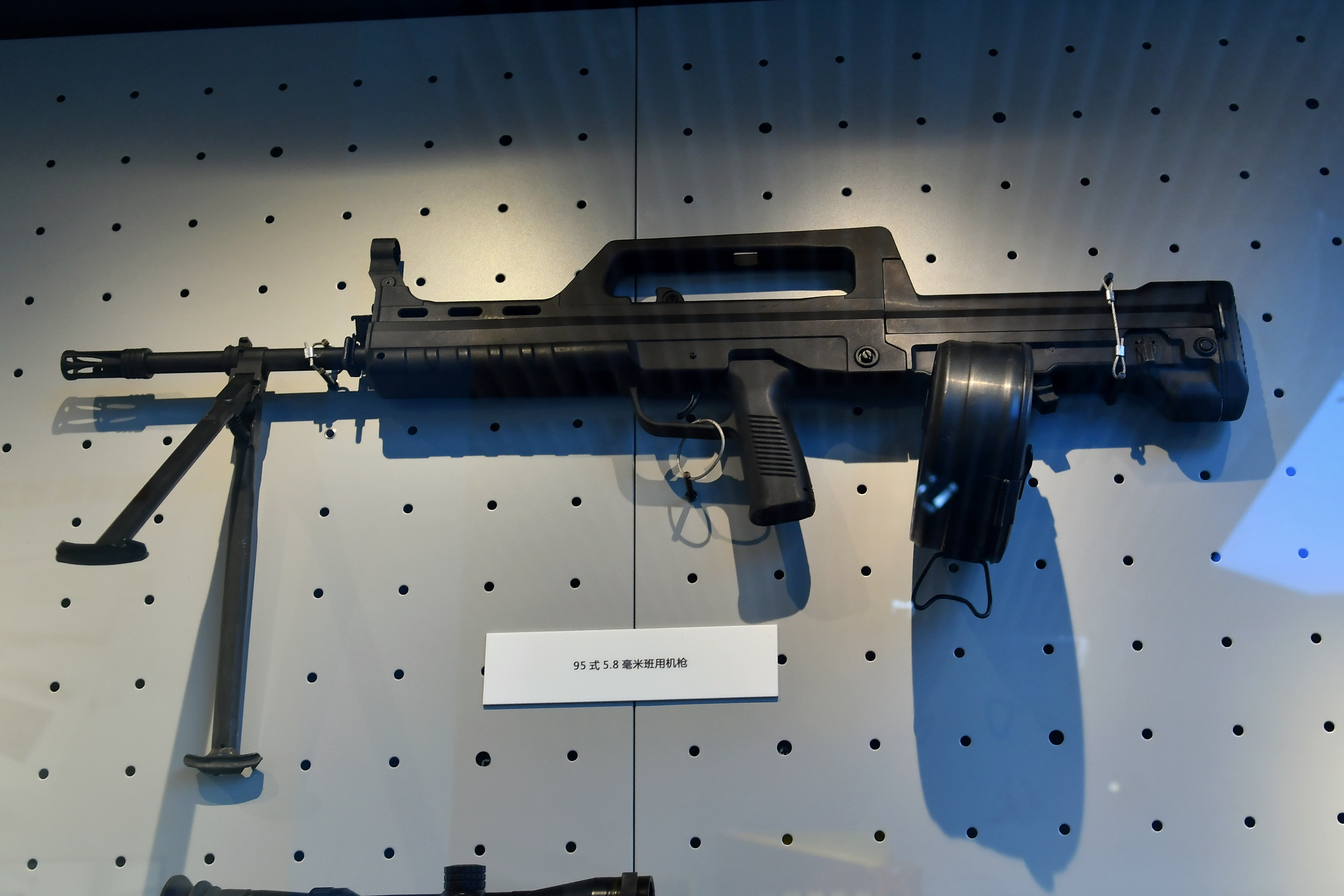 QBB95-5.8mm班用机枪（简称95式班机）